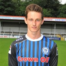 Scott Tanser, 17.